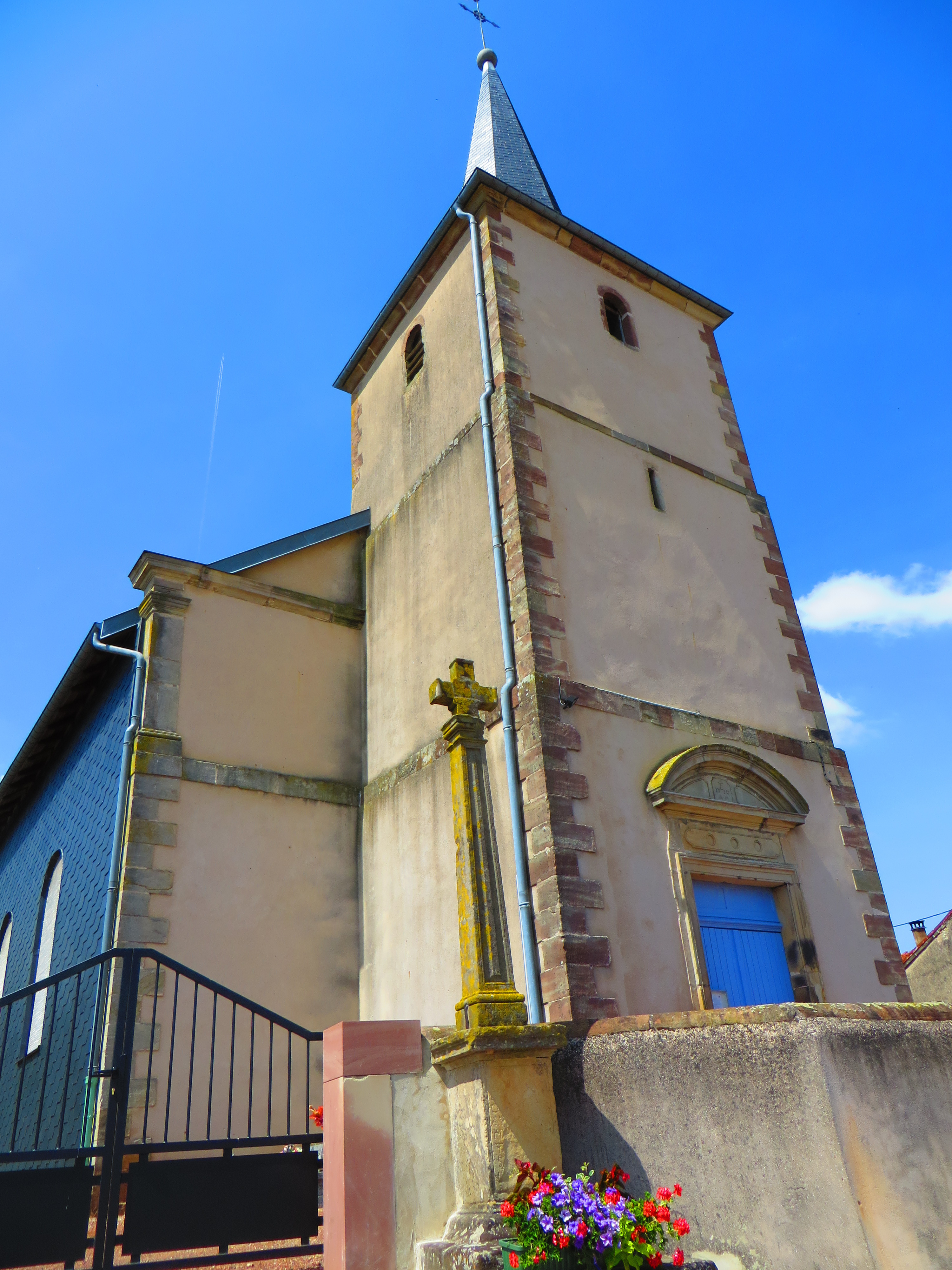 Fraquelfing eglise